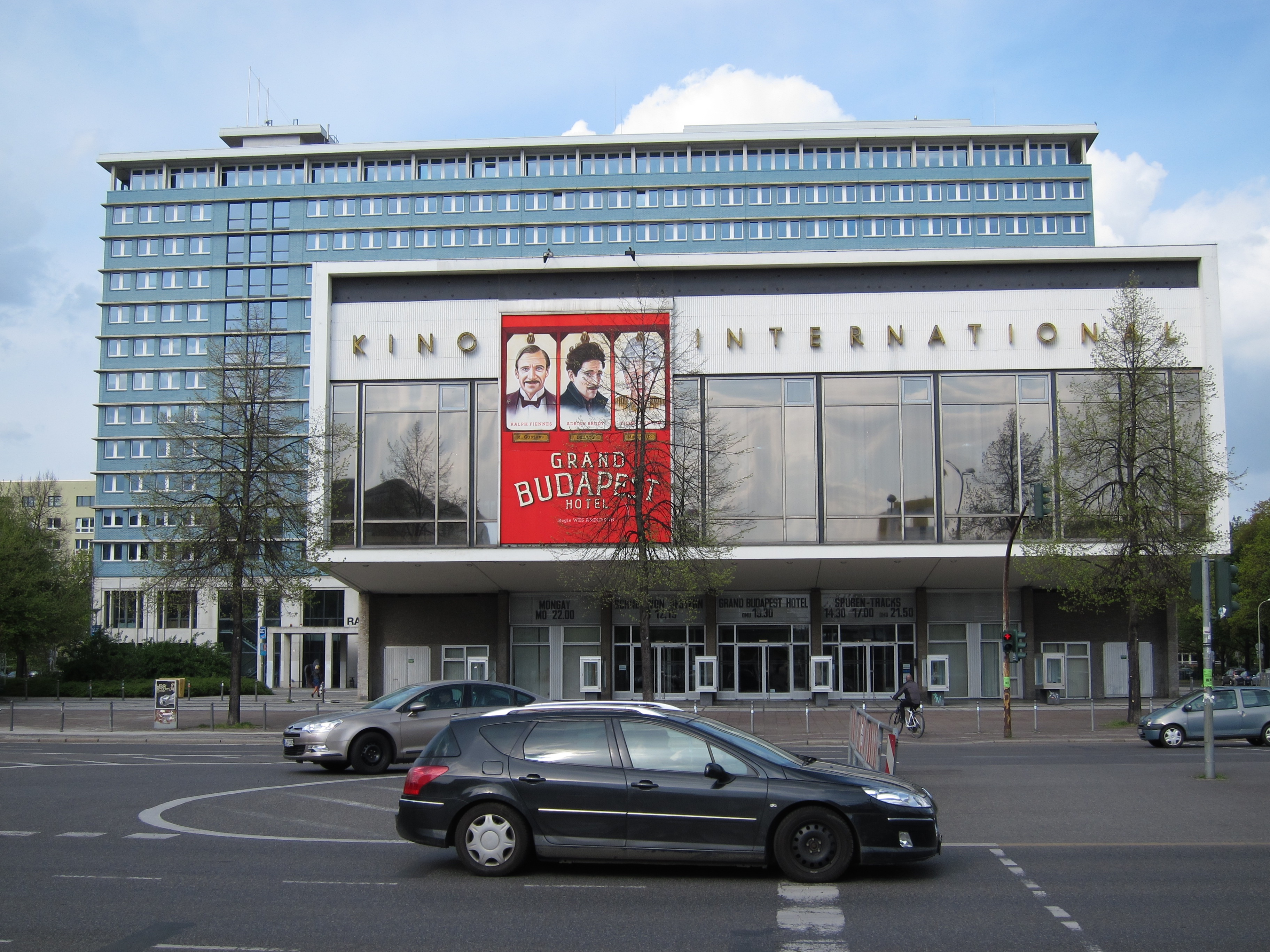 Karl-Marx-Allee